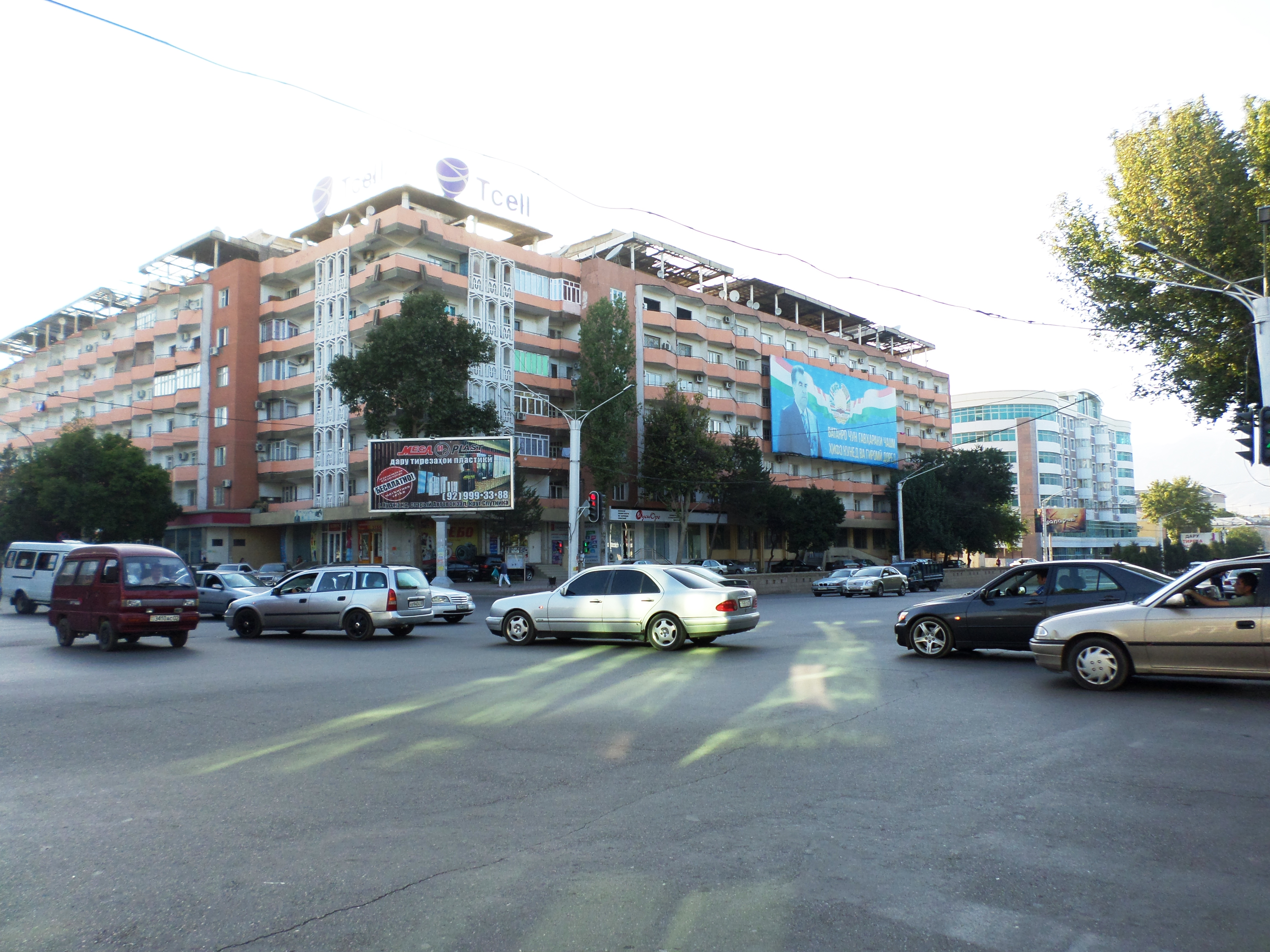 Площадь, мечеть-мавзолей шейха Муслихиддина (XVII—XVIII вв.), г. Худжанд